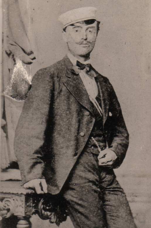 Fotografie von Eugen Benzino als Angehöriger der Schwarzen Transrhenania in München